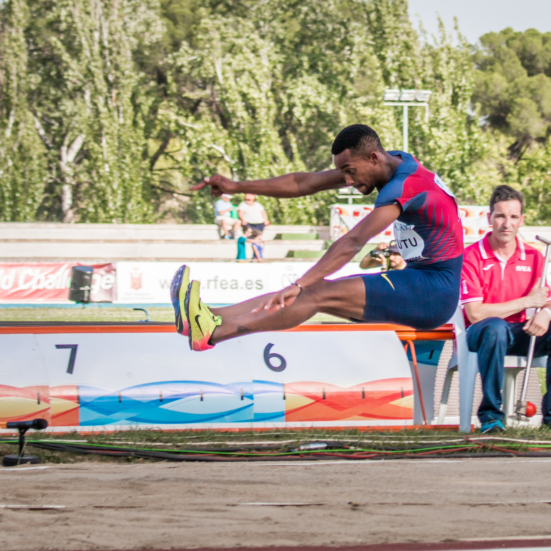 Jean Marie Okutu (ESP). Salto en largo. IAAF World Challenge. Meeting Madrid 2017. Moratalaz, Madrid.